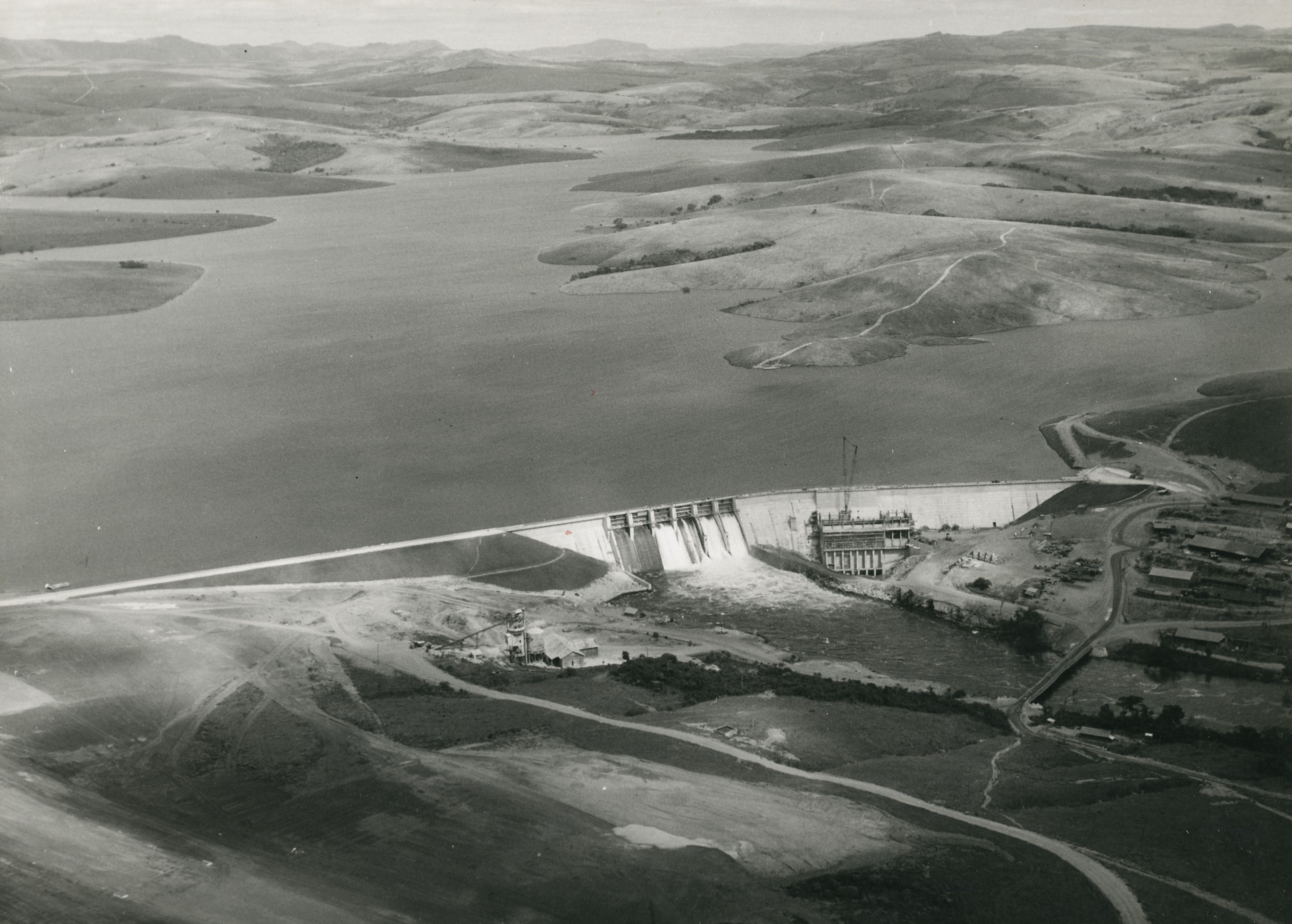 Fotografia do Fundo Correio da Manhã, sob a guarda do Arquivo Nacional.